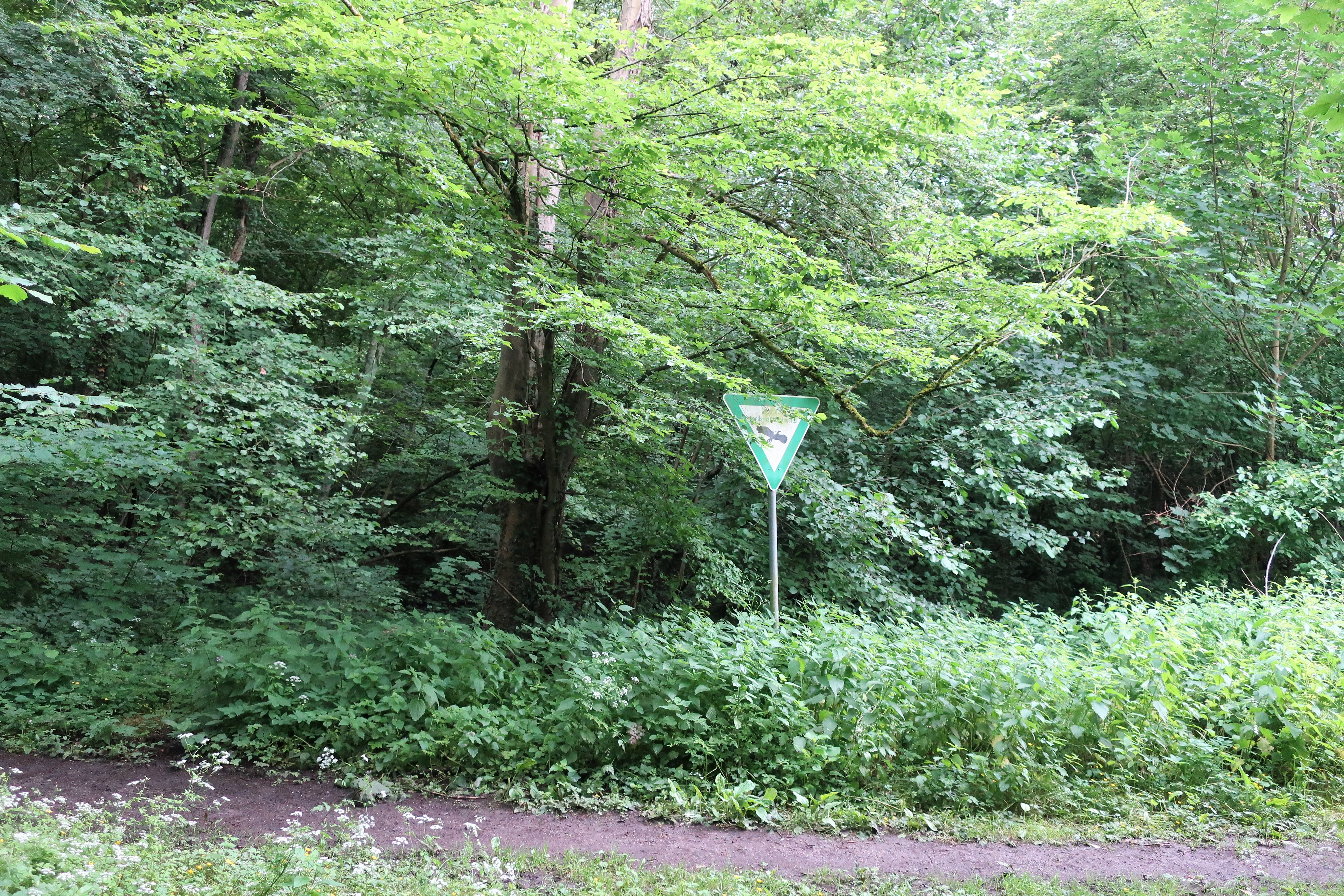 Geschützter Landschaftsbestandteil 1.4.2.39 „Herbecker Siepen“ in Hagen, zwischen Hohenlimburger Straße und der A 46 östlich von Herbeck. Es handelt sich um einen Bachlauf mit angrenzenden Wiesen- und Brachestreifen sowie den östlich anschließenden, bewaldeten Talhang. Im Bereich der ehemaligen Hofstelle wurde das Bachbett verlegt und eine Aufschüttung vorgenommen.